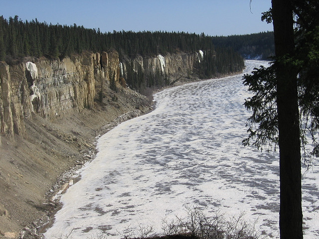 April 29, 2006 - Alexandra Falls, NWT 009